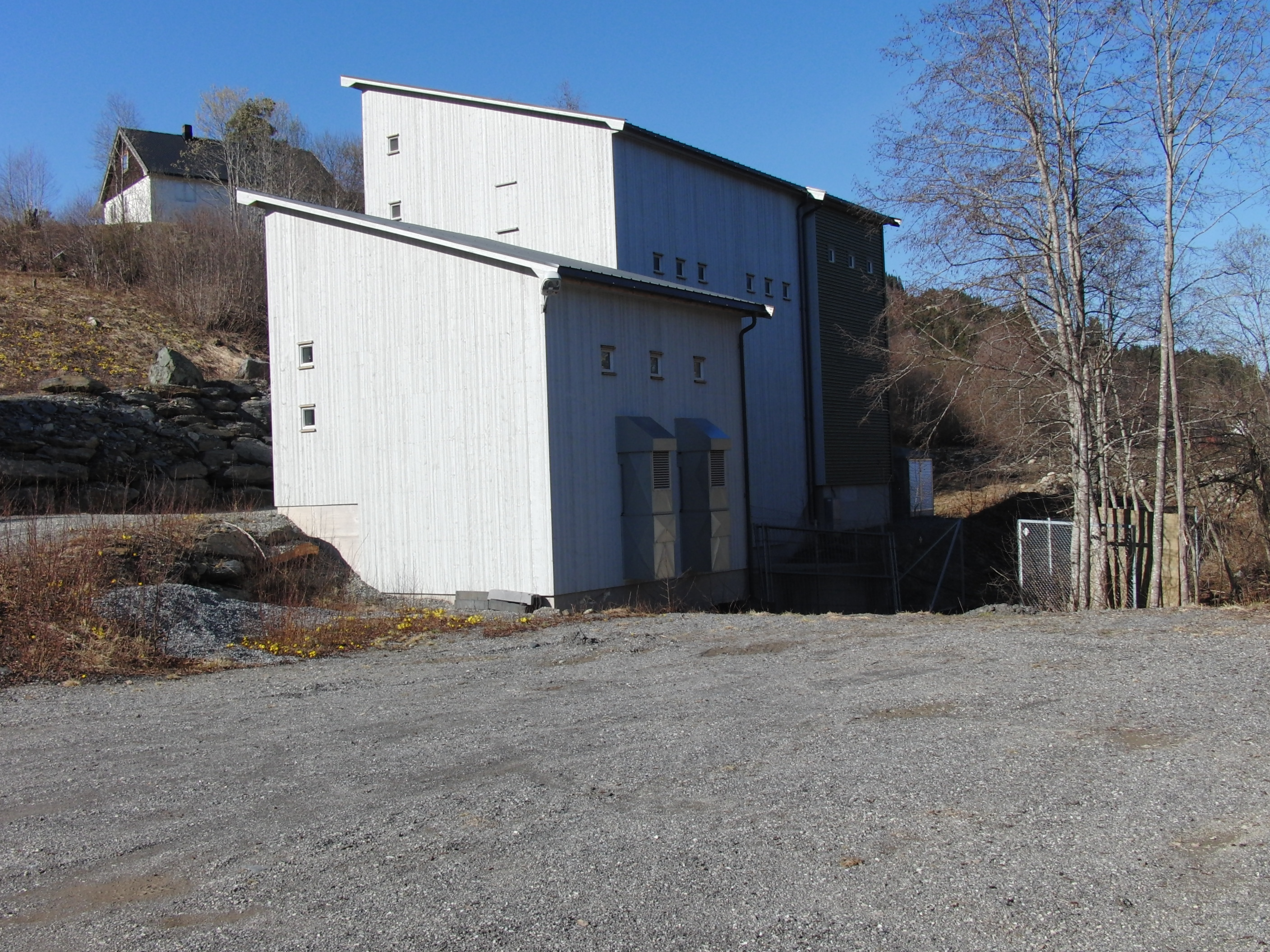 Vorma kraftverk